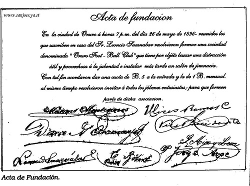 Acta de fundación de Oruru Royal